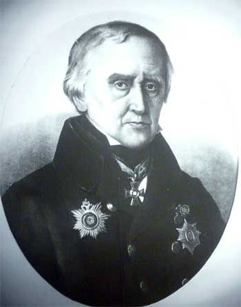 Portrait des Zivilgouverneurs von Livland, George Friedrich von Foelckersahm